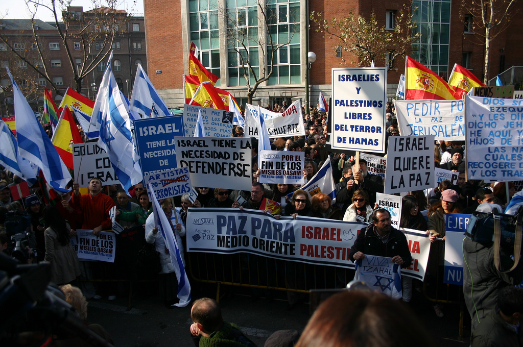 Manifestación en favor de Israel en Madrid, 18 de enero de 2009.